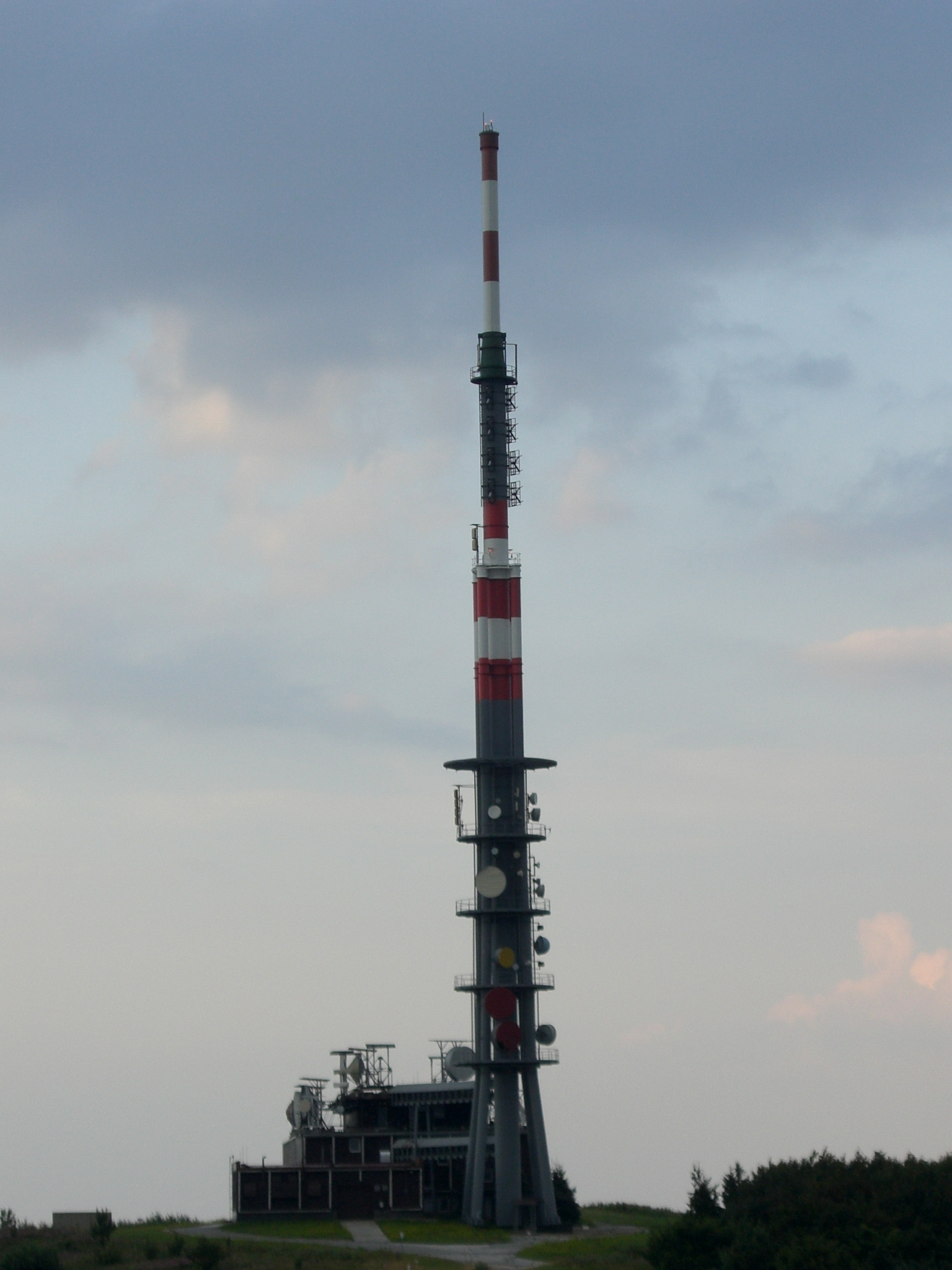 Vysílač na vrcholu Velká Javorina